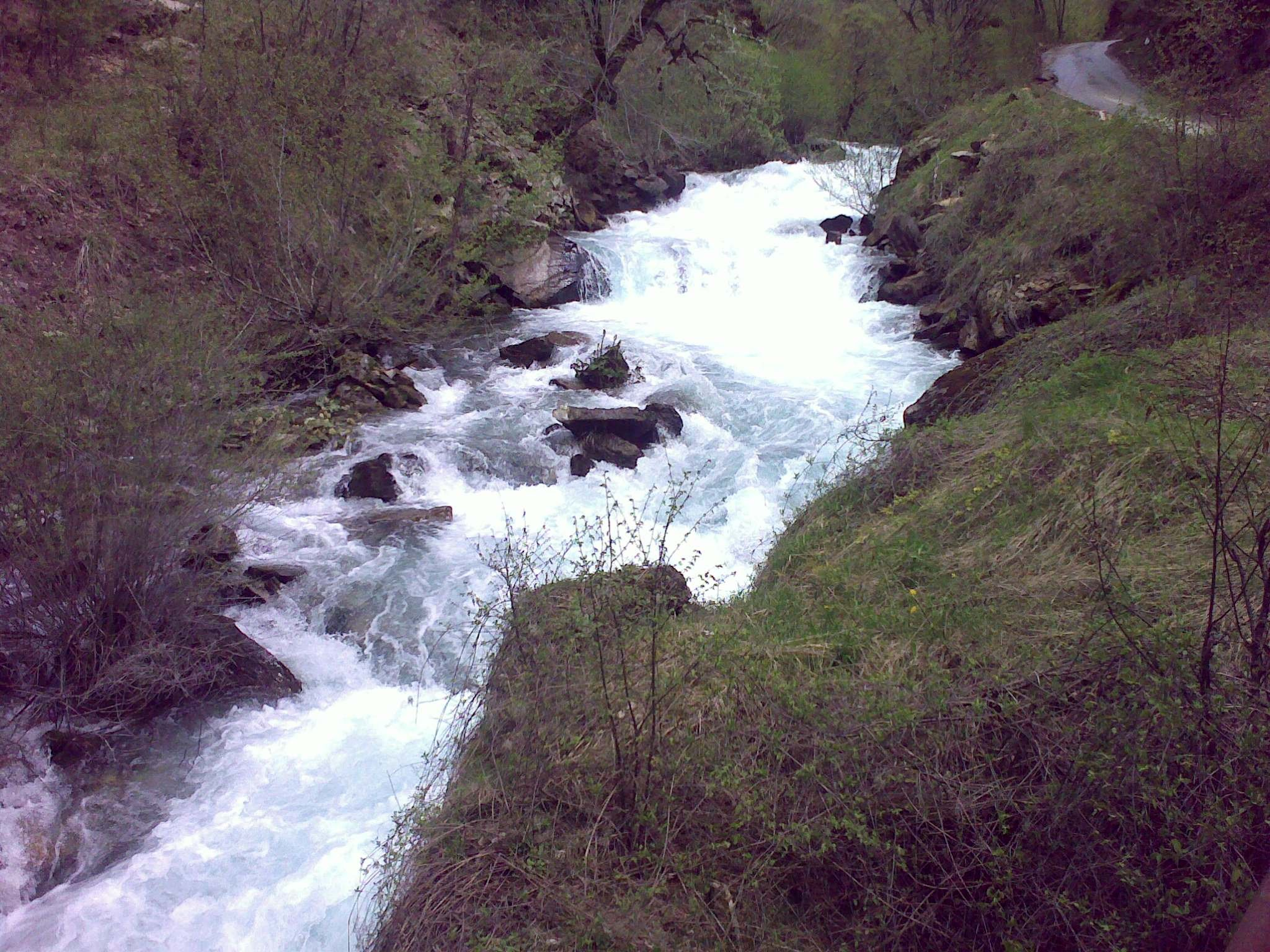 River in Selce, Mavrovo,Macedonia